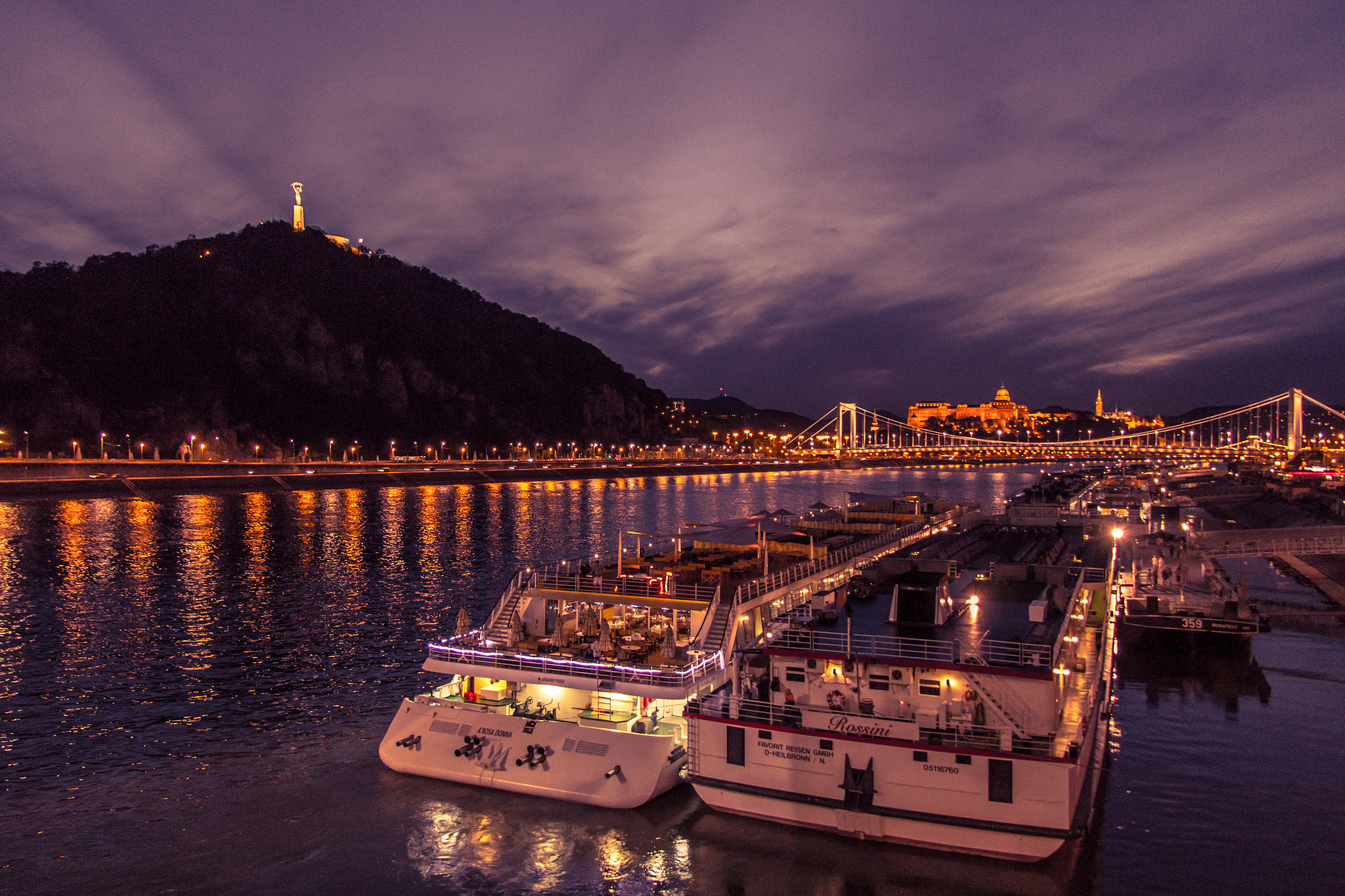 Die Kabinenfahrgstschiffe A-Rosa Donna und Rossini gemeinsam abends am Anleger in Budapest